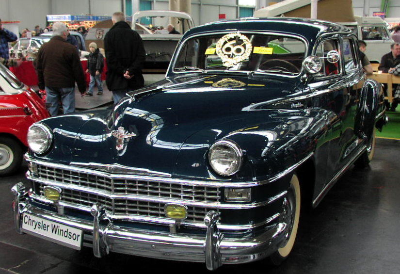 1947 Chrysler Windsor C-38 series Sedan